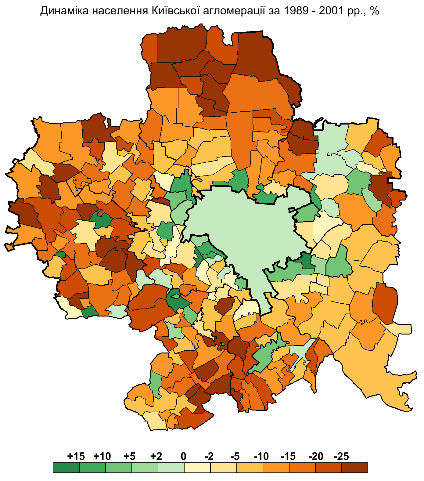 Динаміка населення Київської агломерації за період між переписами 1989 і 2001 рр. / Population dynamics of Kyiv metropolitan area, 1989-2001